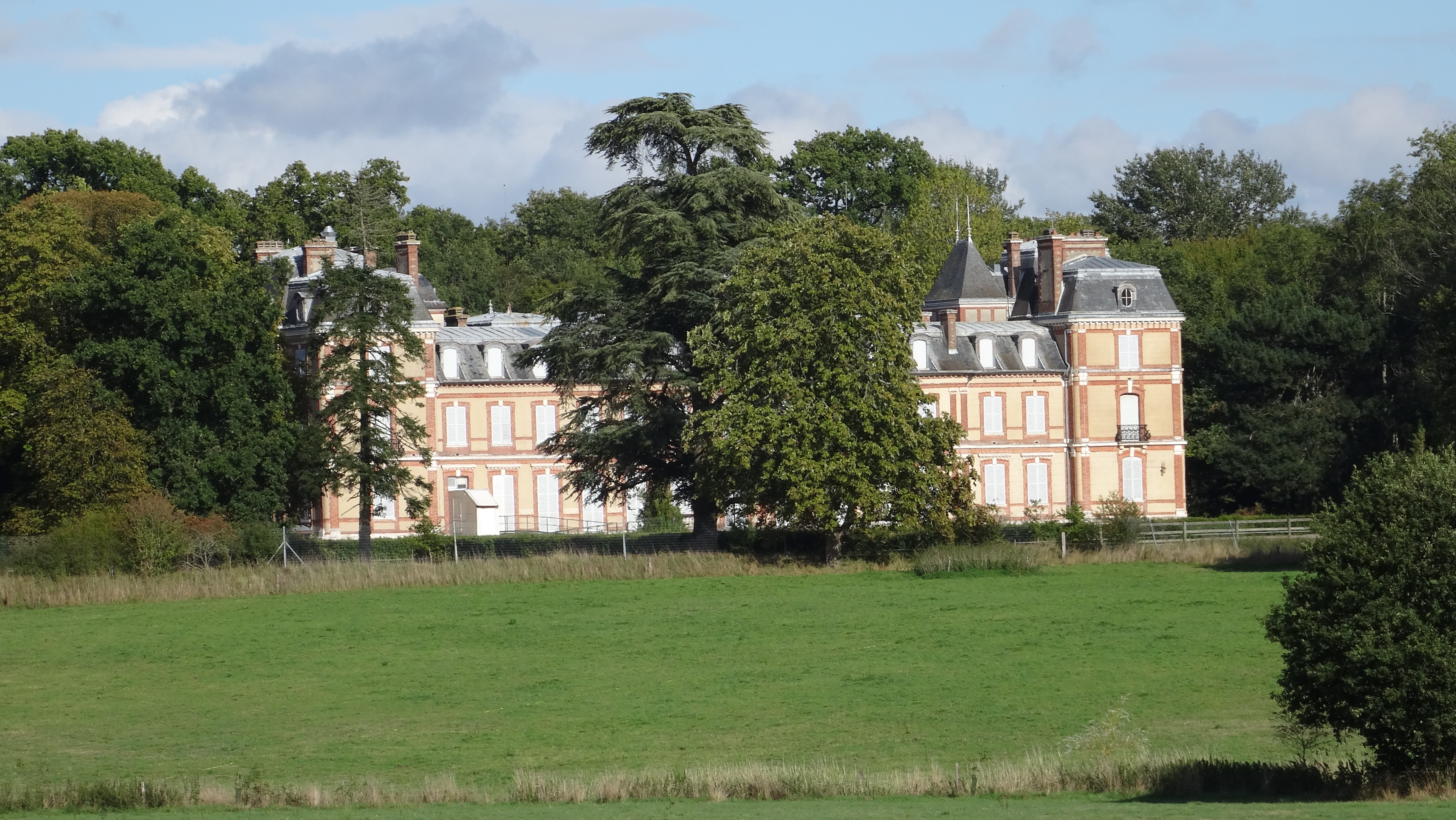 Château de Boulains à Échouboulains. (Seine-et-Marne, région Île-de-France).